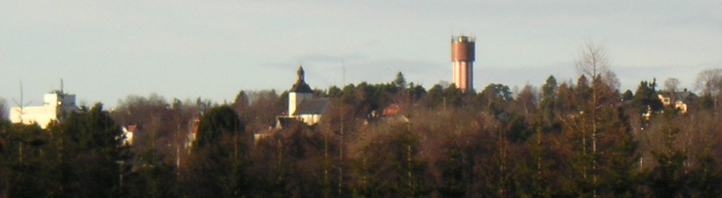 Vy av Järna